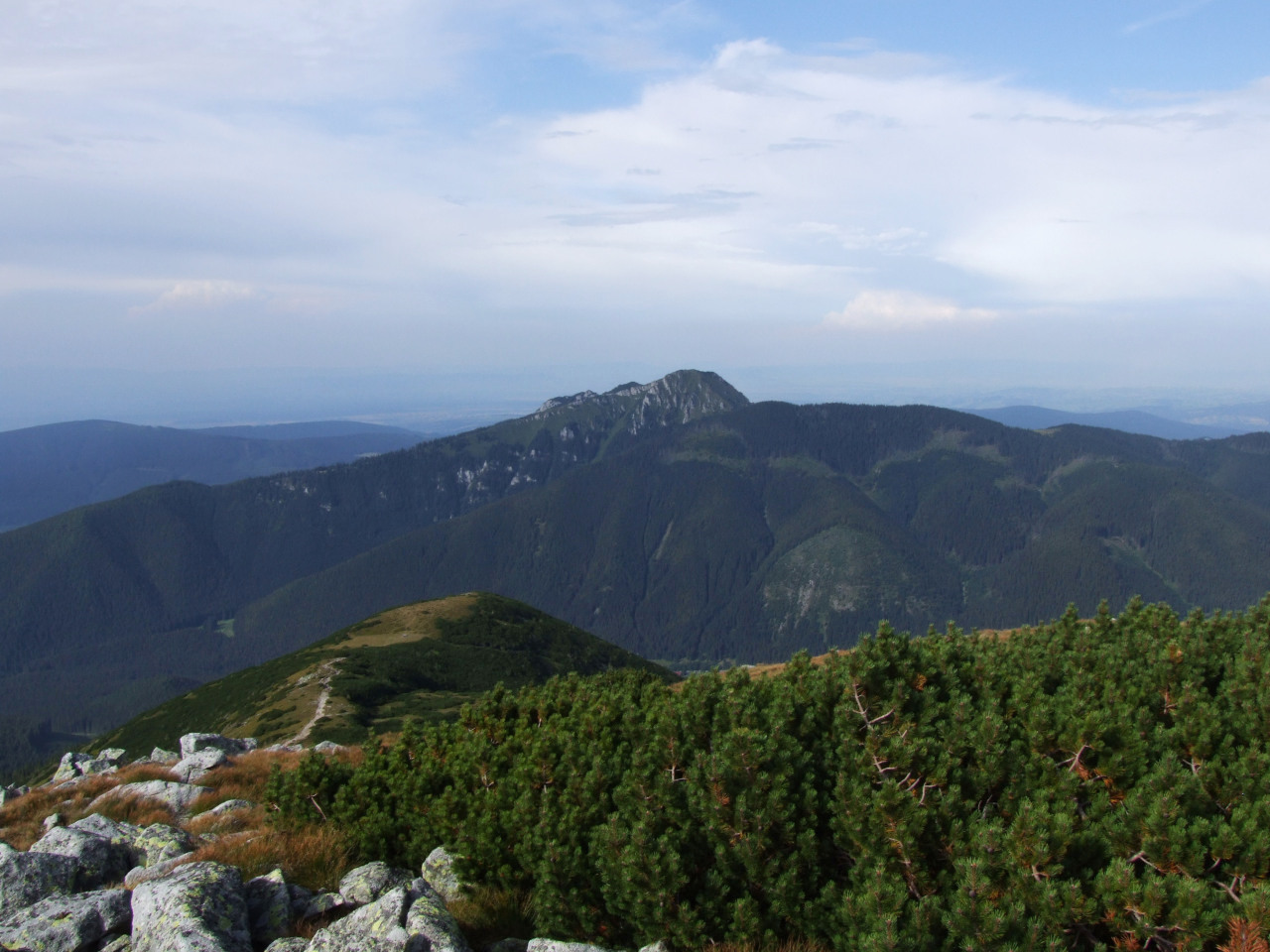 Osobita i Jaworzyna. Na dole Przedni Salatyn. Widok z Brestowej